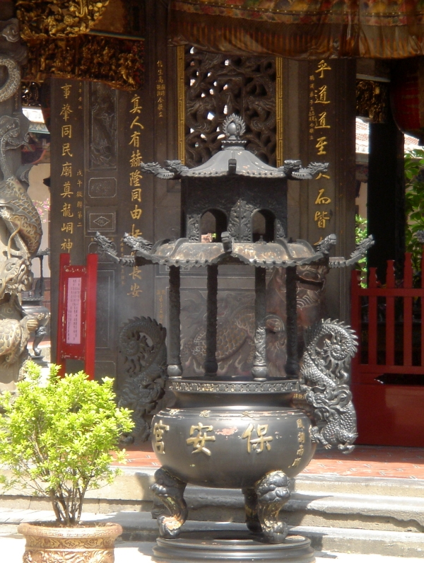 Diambil pada Oktober 2005 di Pekong Bao An (保安宮) di Taipei Taiwan oleh penyumbang foto.